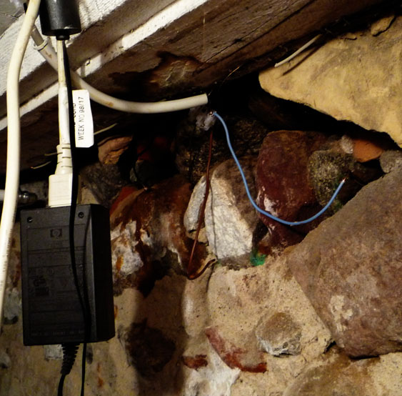 Elektroosmose: Katode er bredt ud, at opnå eletrisk forbindelse til det tøre træ. Omkring Katode er tør og stor kontaktflad påkrævet.